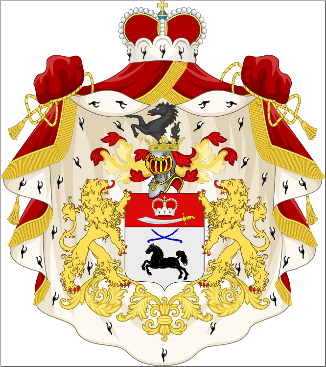 герб князей абашидзе в составе утвержденного герба Абашидзе-Горленко Unknown